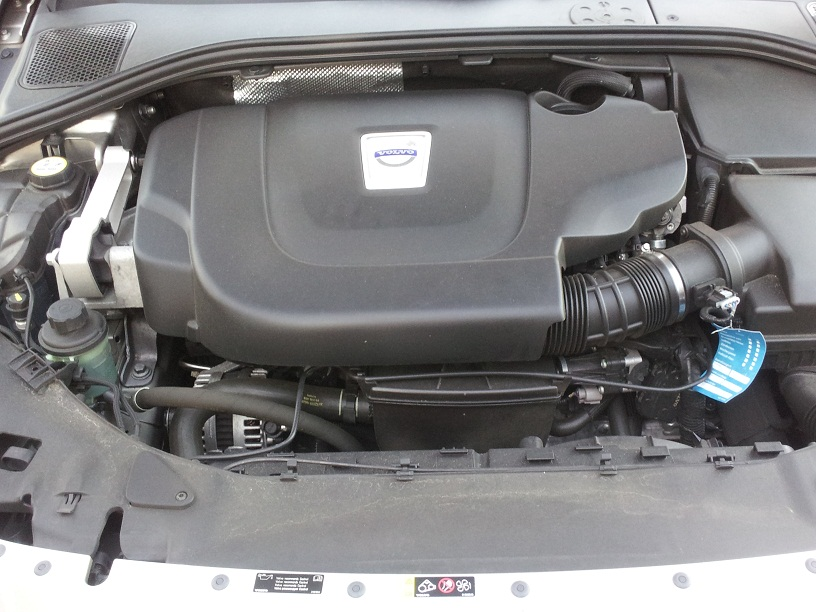 Volvo D3-Motor (MY2011)